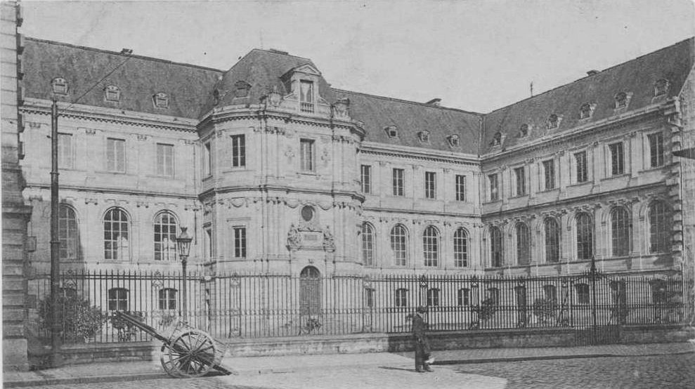 Palais des facultés de Caen, cour sur la rue Saint-Sauveur avant la construction de la bibliothèque (1903).